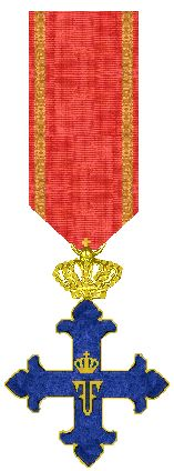 Orde als in 1916, IIIe Klasse